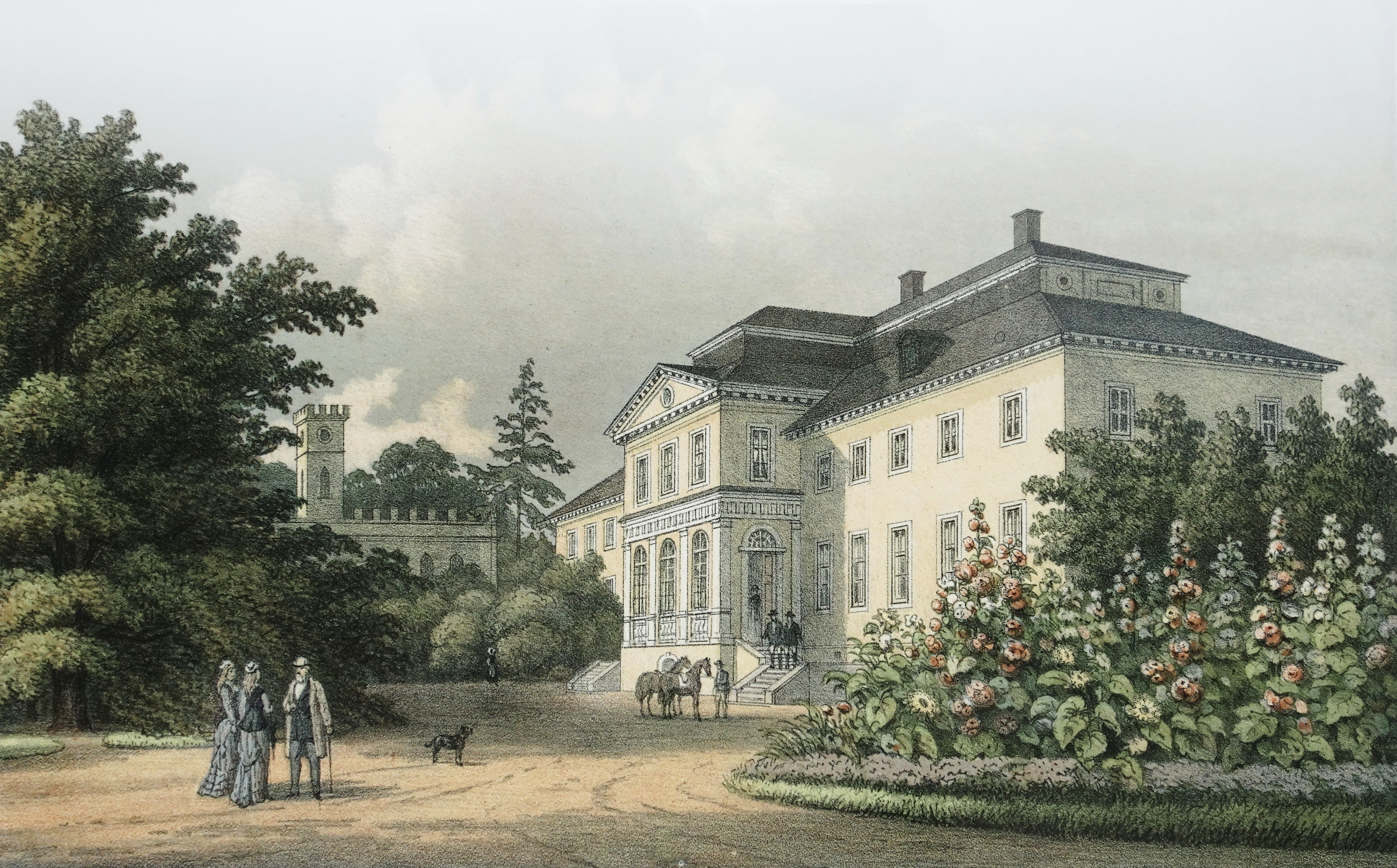 Ekebyhovs slott omkring 1870, av Alexander Nay